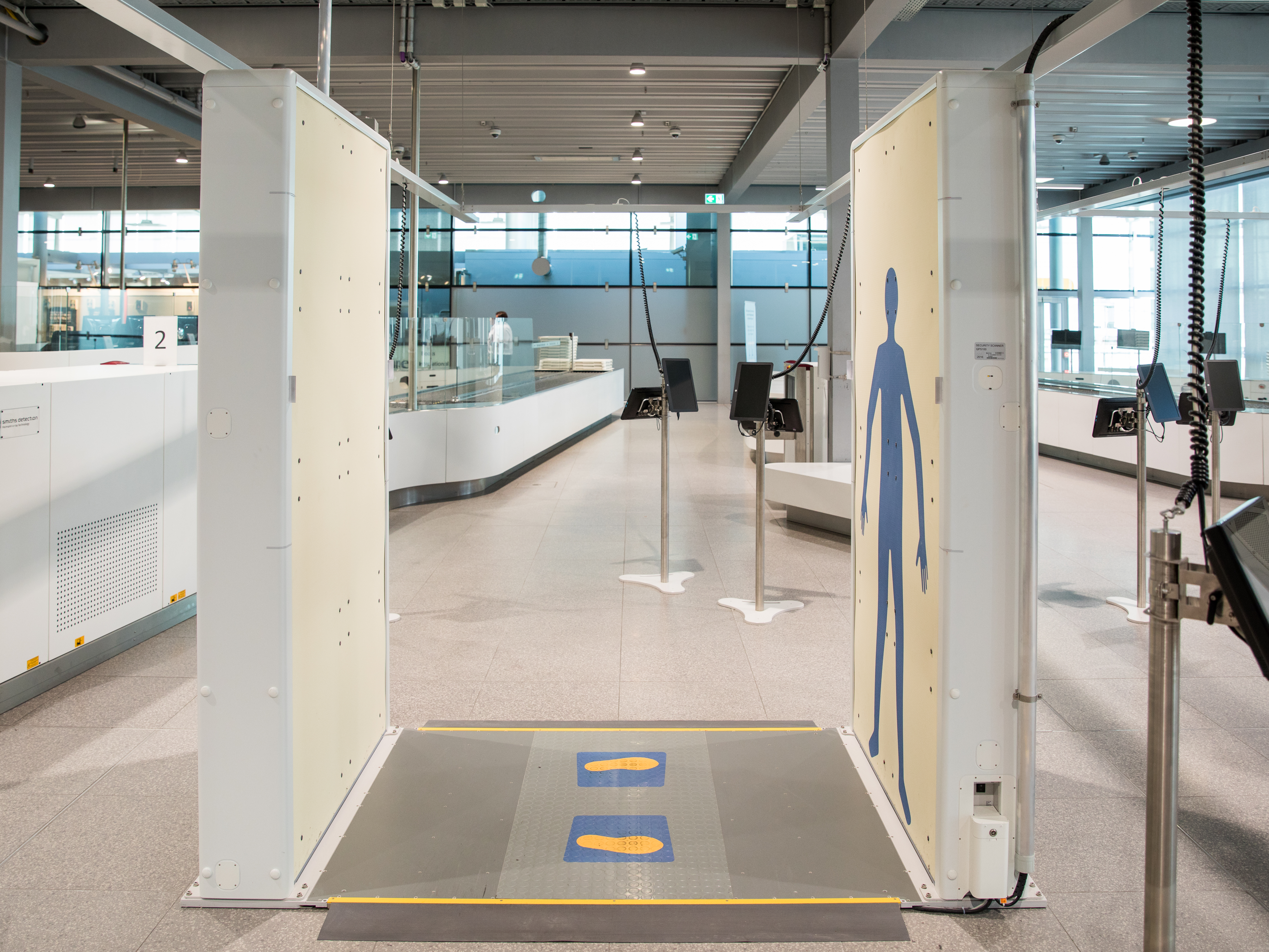 Besuch von NRW-Verkehrsminister Hendrik Wüst und Steffen Bilger, Parlamentarischer Staatssekretär beim Bundesminister für Verkehr und digitale Infrastruktur am Flughafen Köln/Bonn: Vorstellung der Sicherheitskontrollfläche Easy Security Foto: Körperscanner/Bodyscanner, Hersteller: Rohde & Schwarz, Modell „R&S QPS100 Quick Personnel Security Scanner“